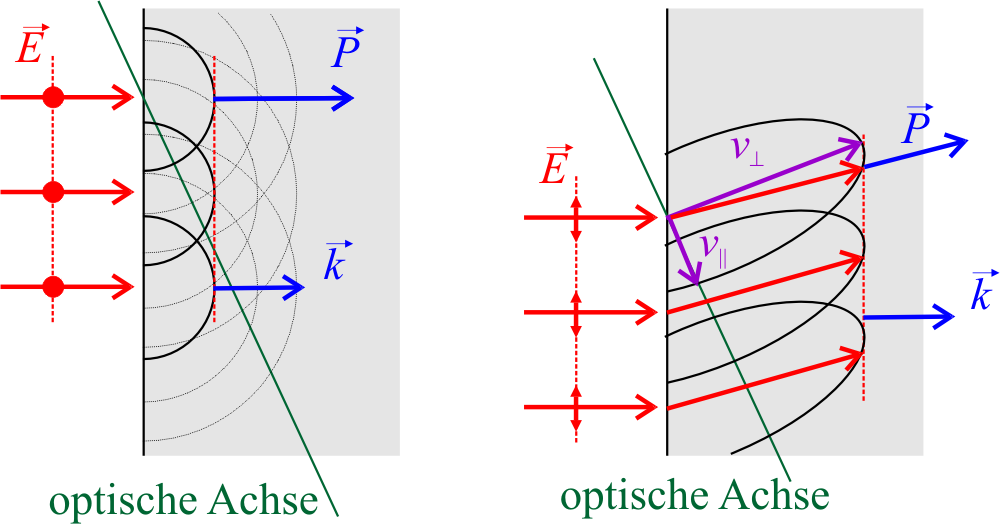 schematische Zeichnung zur Doppelbrechung